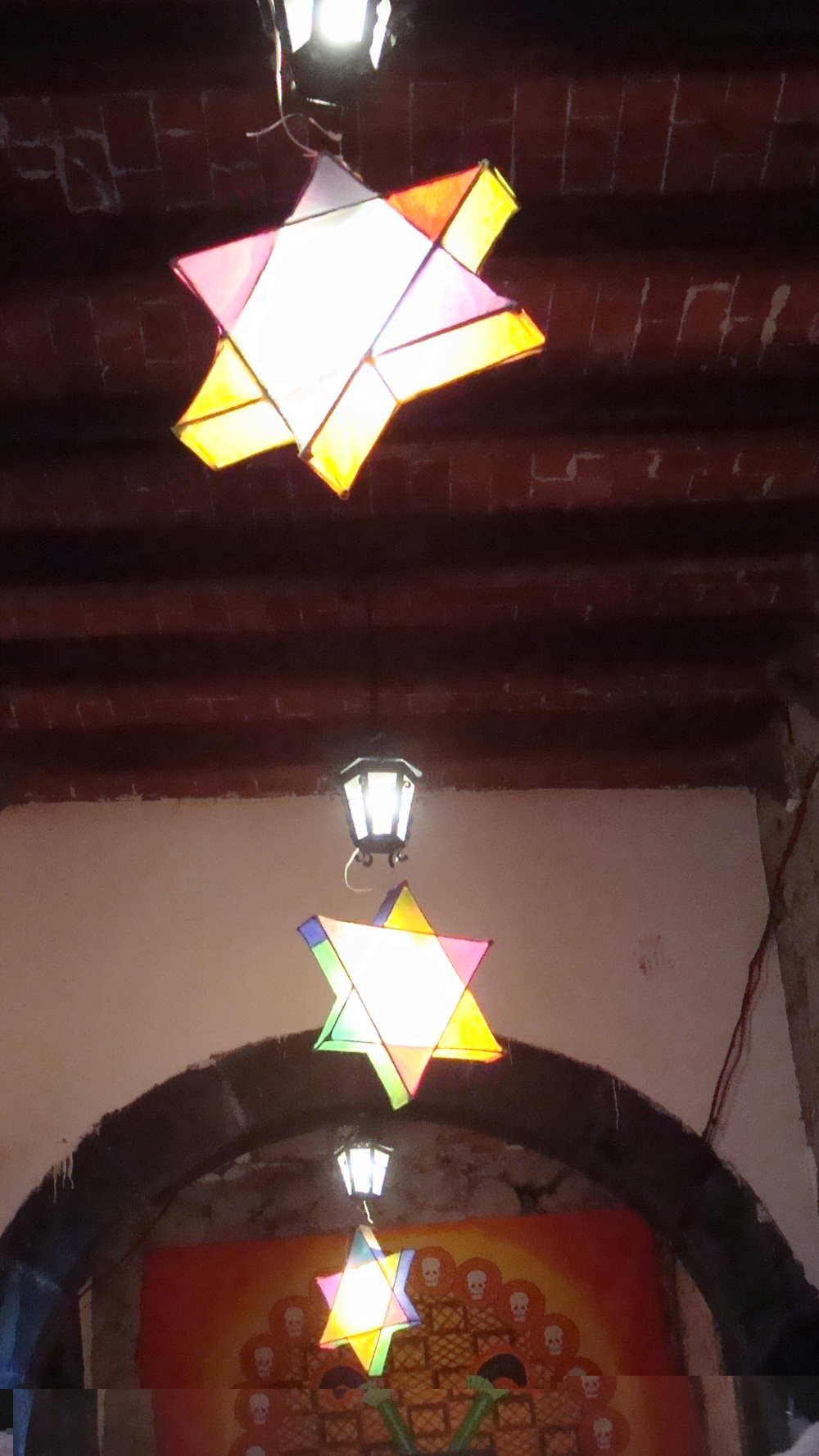 En varios pueblos del sur del Distrito Federal (México) es tradición colocar estrellas de papel iluminadas por bombillas en las entradas de las casas en los días de muertos. En la imagen, estrellas en la arcada del templo de San Andrés Apóstol, de San Andrés Míxquic.